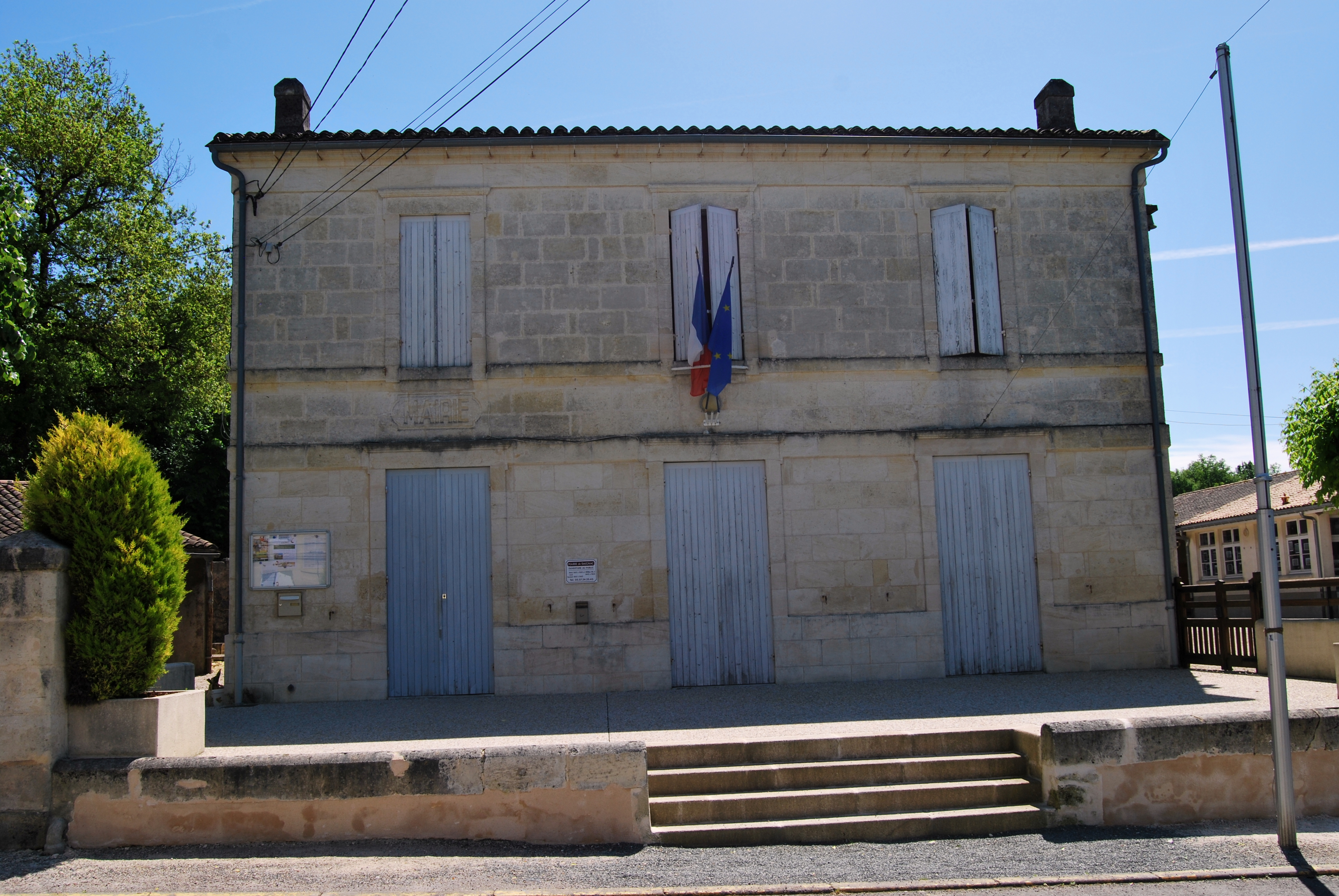 Daignac